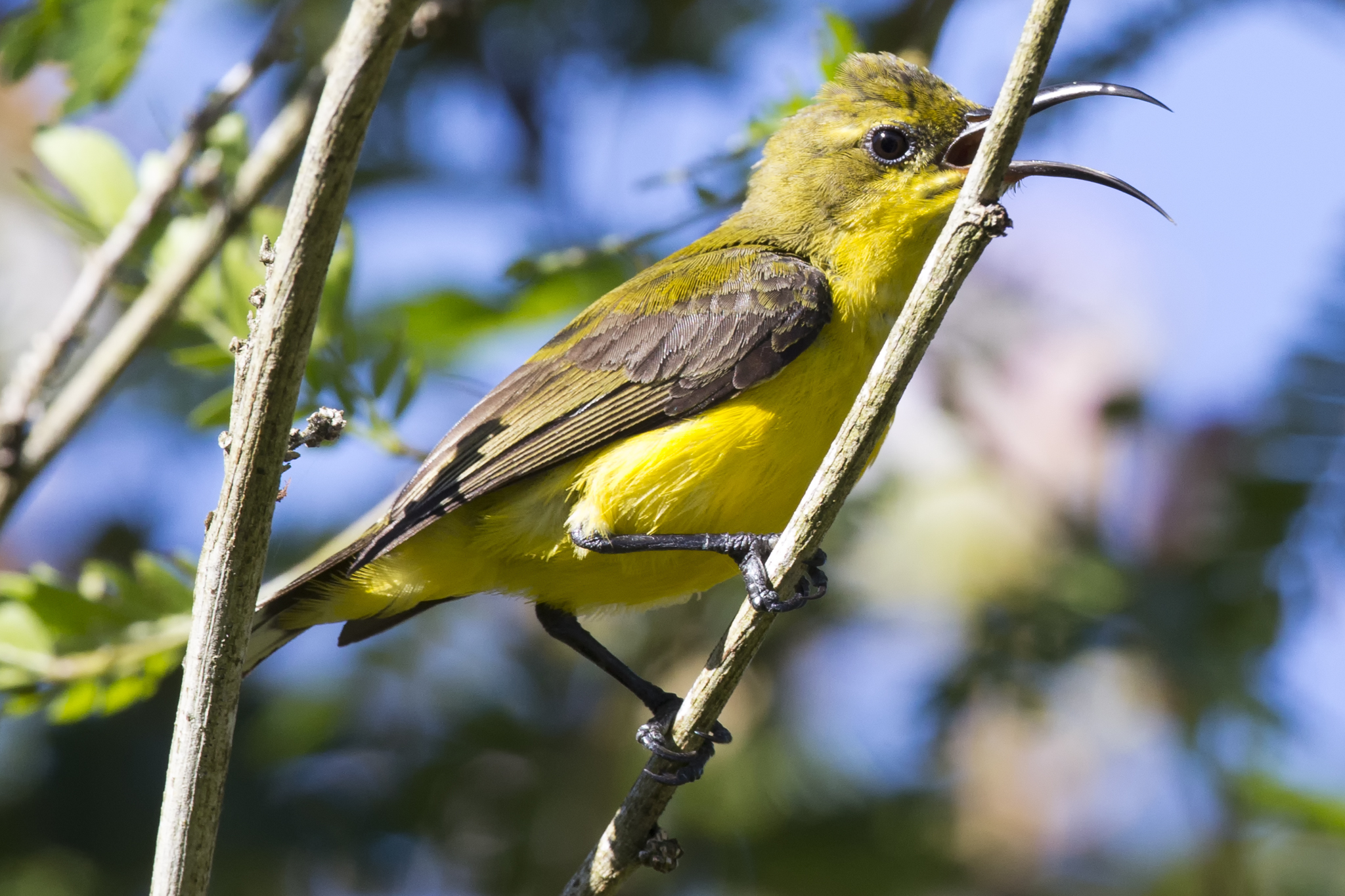 A small female sunbird